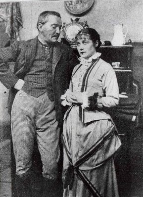 Móricz Zsigmond: Nem élhetek muzsikaszó nélkül. Társulat: Nemzeti Színház, Budapest. Bemutató: 1928.12.08. Rendező: Hevesi Sándor. Szereplők: Petheő Attila, Somogyi Erzsi. Hungarian Theatre Museum and Institute LocationBudapestCoordinates47° 29′ 51.75″ N, 19° 01′ 47.32″ E Established1952Web pageszinhaziintezet.huAuthority control : Q1226166 VIAF: 152589477 ISNI: 0000 0001 0945 5202 BNF: 123022856 institution QS:P195,Q1226166